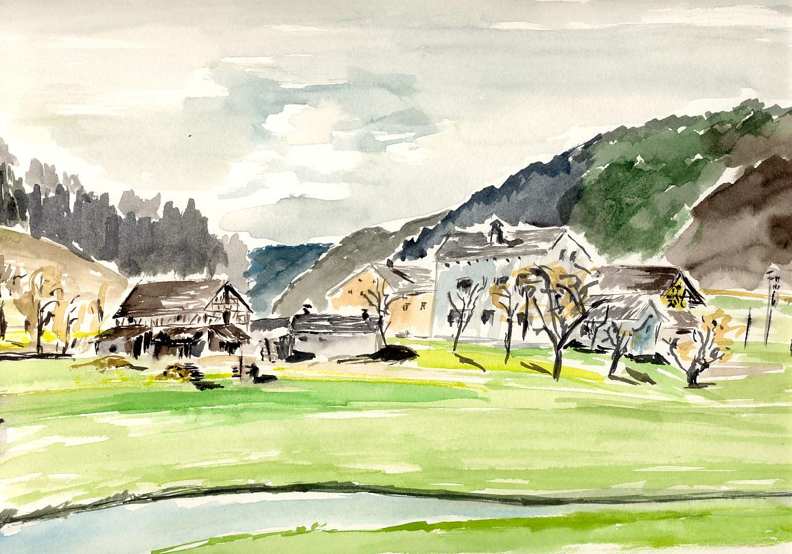 Eibwang im Anlautertal, Landkreis Eichstätt. Aquarell des Weilers von Siegfried Schieweck-Mauk, Eichstätt, Werk-Verz. Nr. 615